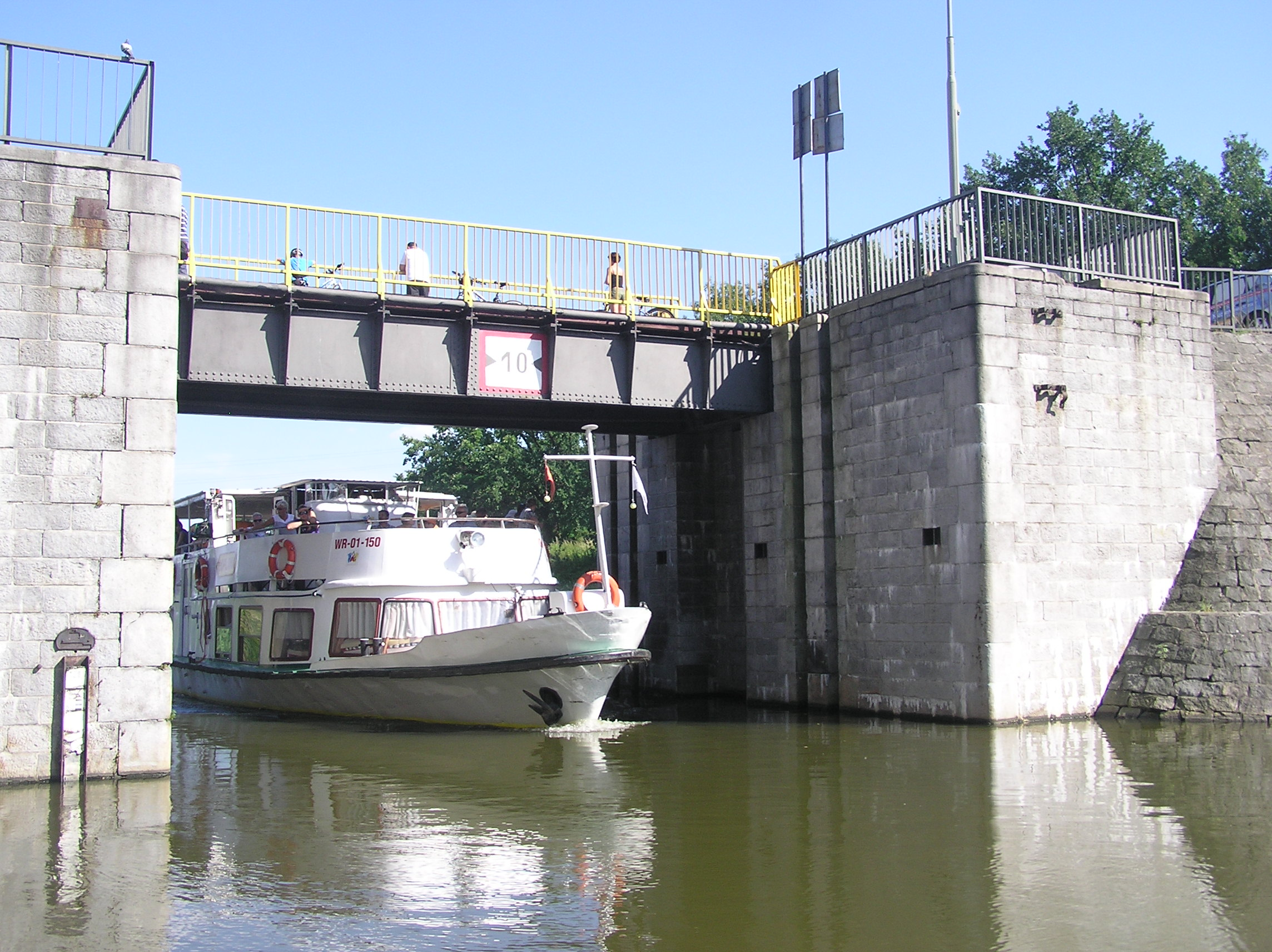 Wrocław, Ołbin, Kanał Miejski, Brama Przeciwpowodziowa, Most Burzowy